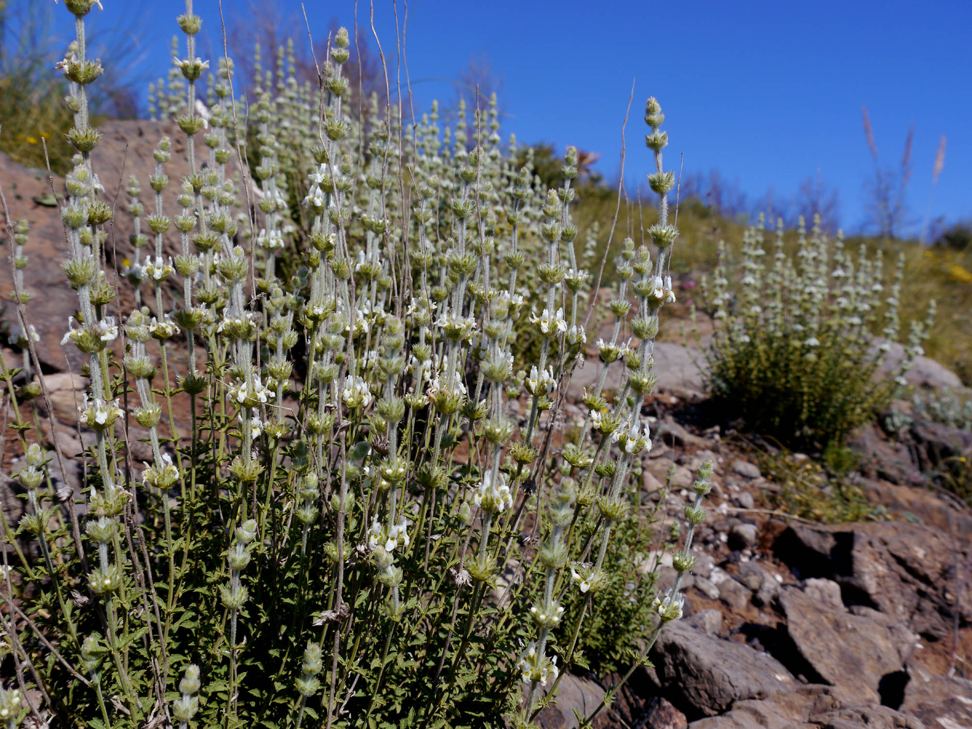 Sideritis pusilla subsp. carthaginensis en la Peña del Águila, Portmán (España).